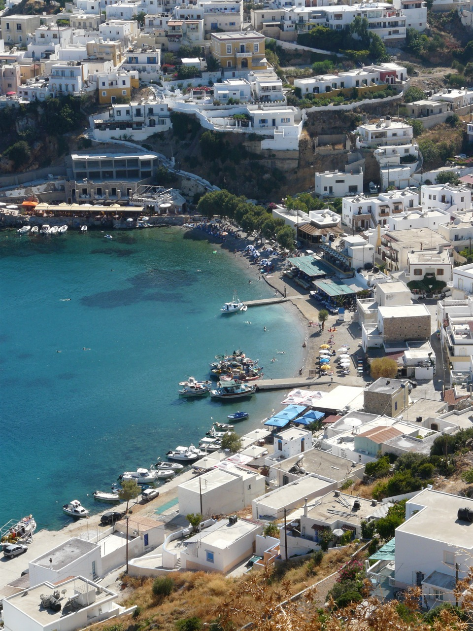 Panteli